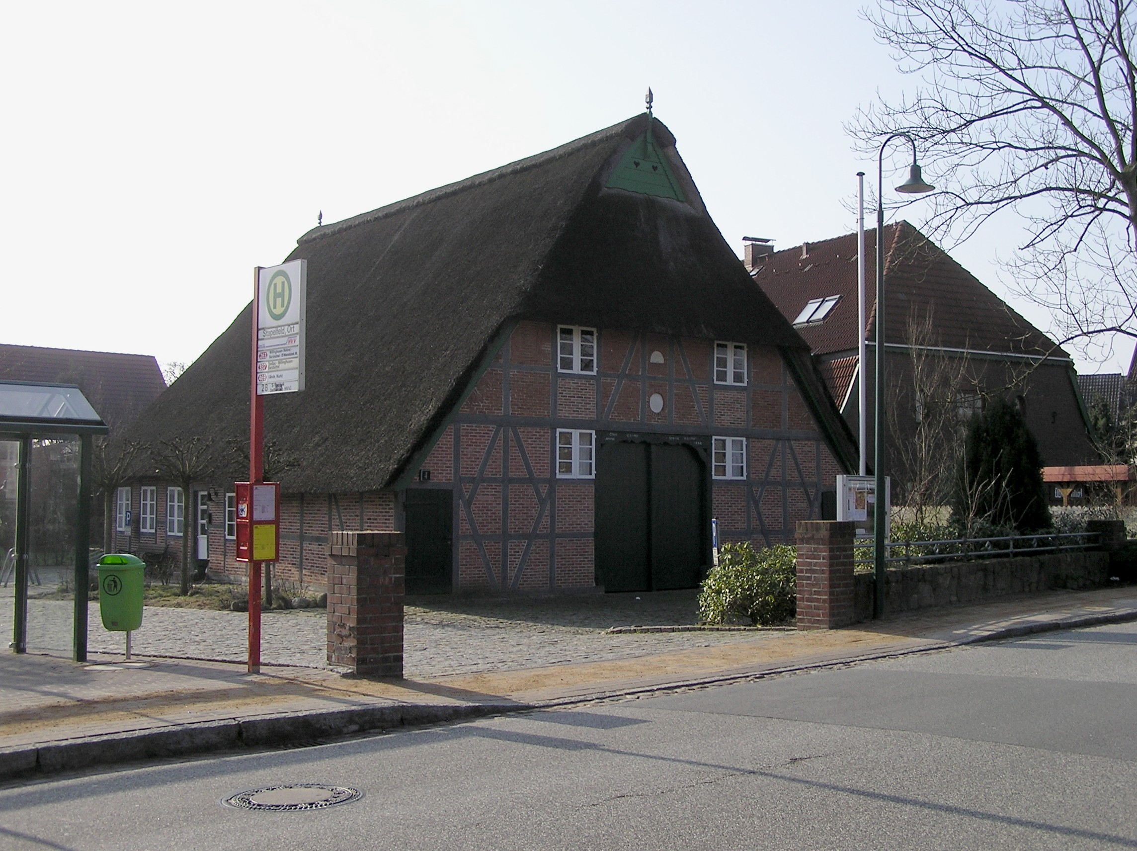 Zweiständer Fachwerkhallenhaus aus dem Jahr 1834 in Stapelfeld (Stormarn).